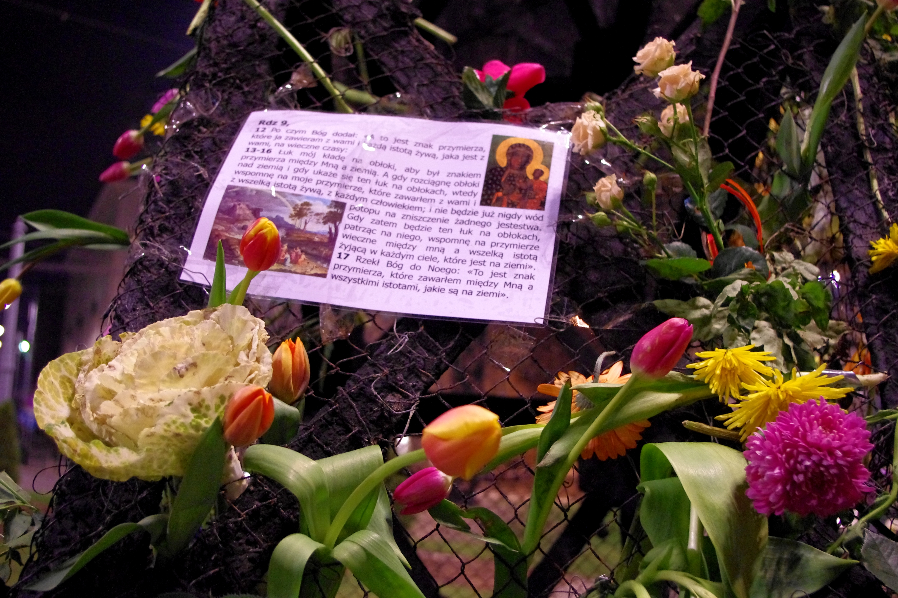 ”Tęcza” ma warszawskim placu Zbawiciela, dzień po spaleniu podczas Marszu Niepodległości 2013